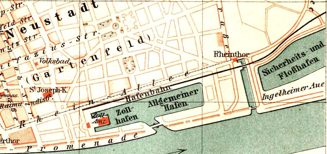 Stadtplan (Umgebung) von Mainz, hier Zollhafen (Mainz)